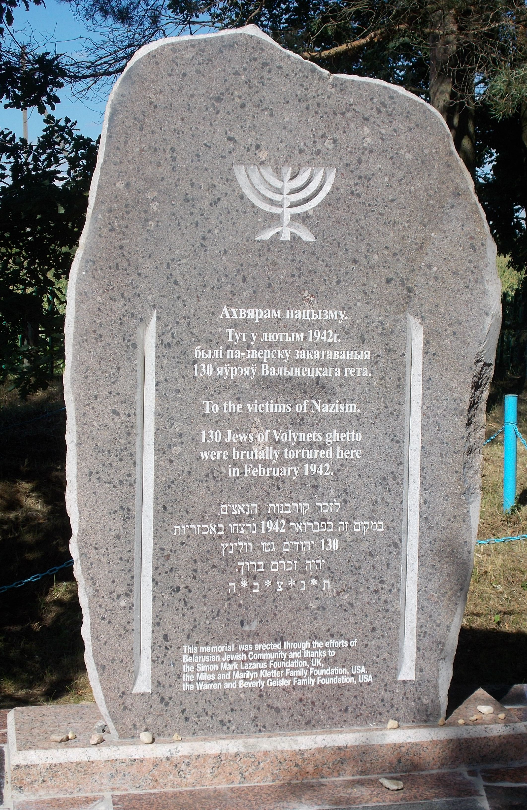 Памятник на месте убийства 130 евреев - узников Волынецкого гетто (Верхнедвинский район). Установлен в 2013 году.